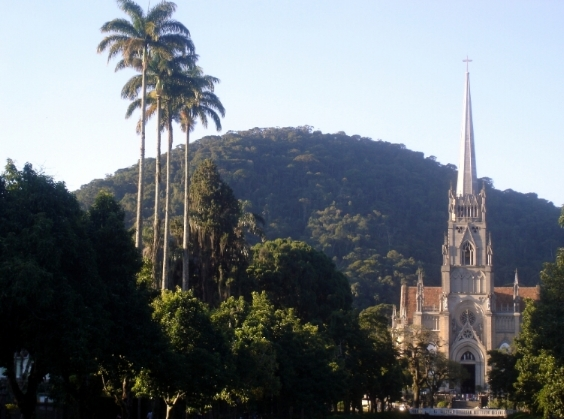 Foto: JorgitoBoucas Catedral São Pedro de Alcântara em Petrópolis, Rio de Janeiro, Brasil